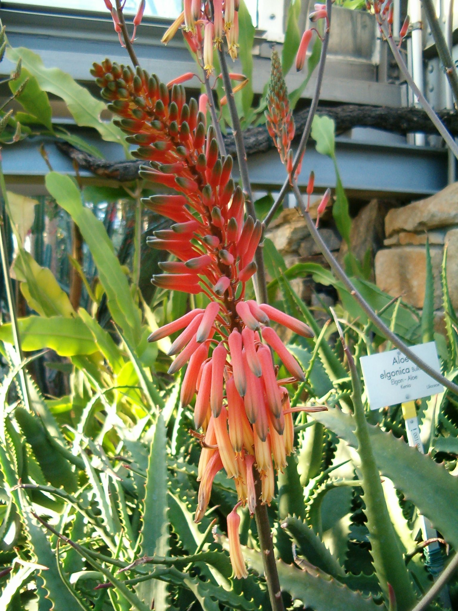 Aloe elgonica Location: Botanical Gardens Berlin Inflorescence